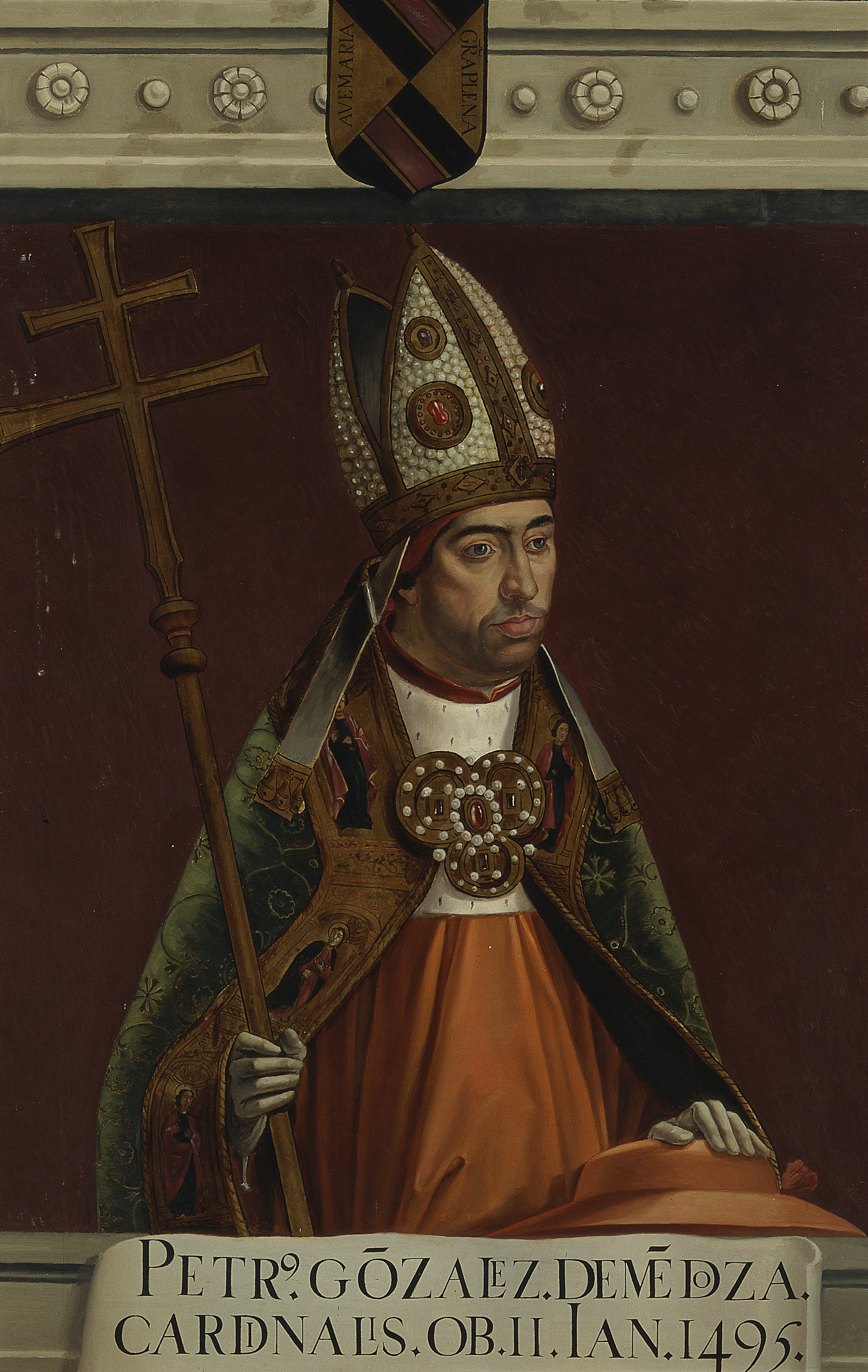 Retrato del eclesiástico español Pedro González de Mendoza (1428-1495), que llegó a ser cardenal de la Iglesia Católica y obispo de Sigüenza, Osma y Calahorra y arzobispo de Toledo. Esta obra es una copia decimonónica del retrato del cardenal pintado por Juan de Borgoña y conservado en la Sala capitular de la catedral de Toledo.